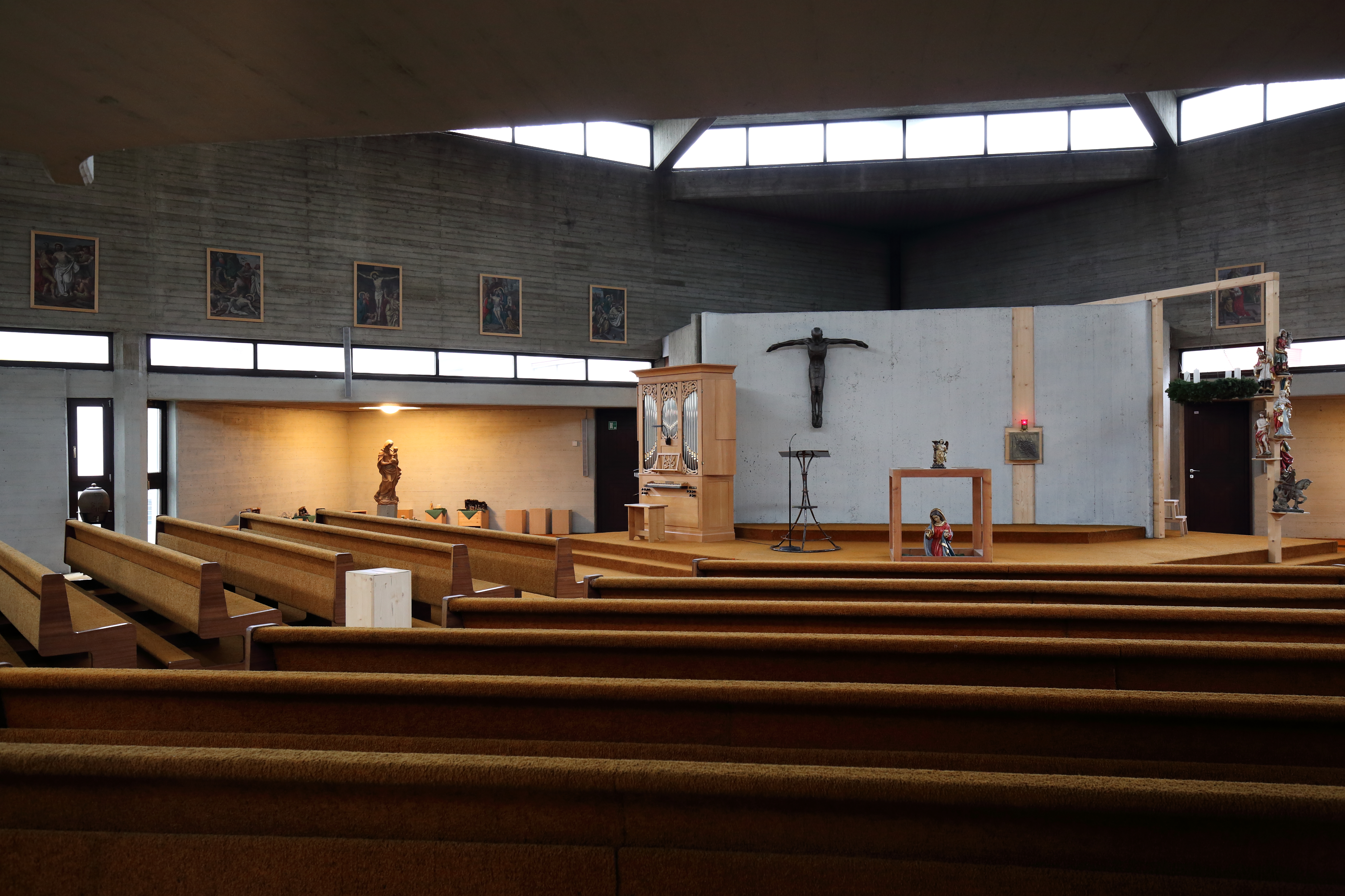 Innenansicht der Pfarrkirche St. Klemens im 11. Wiener Gemeindebezirk Simmering.